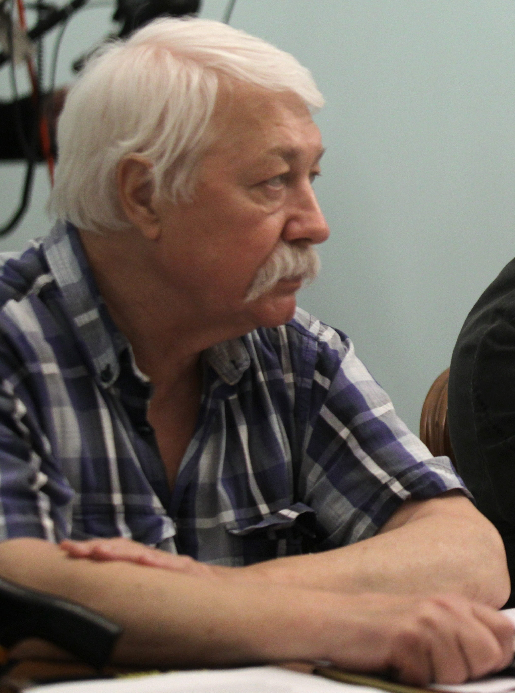 Режиссер-мультипликатор Э. В. Назаров на встрече Председателя Правительства Российской Федерации В. В. Путина с деятелями отечественной мультипликации